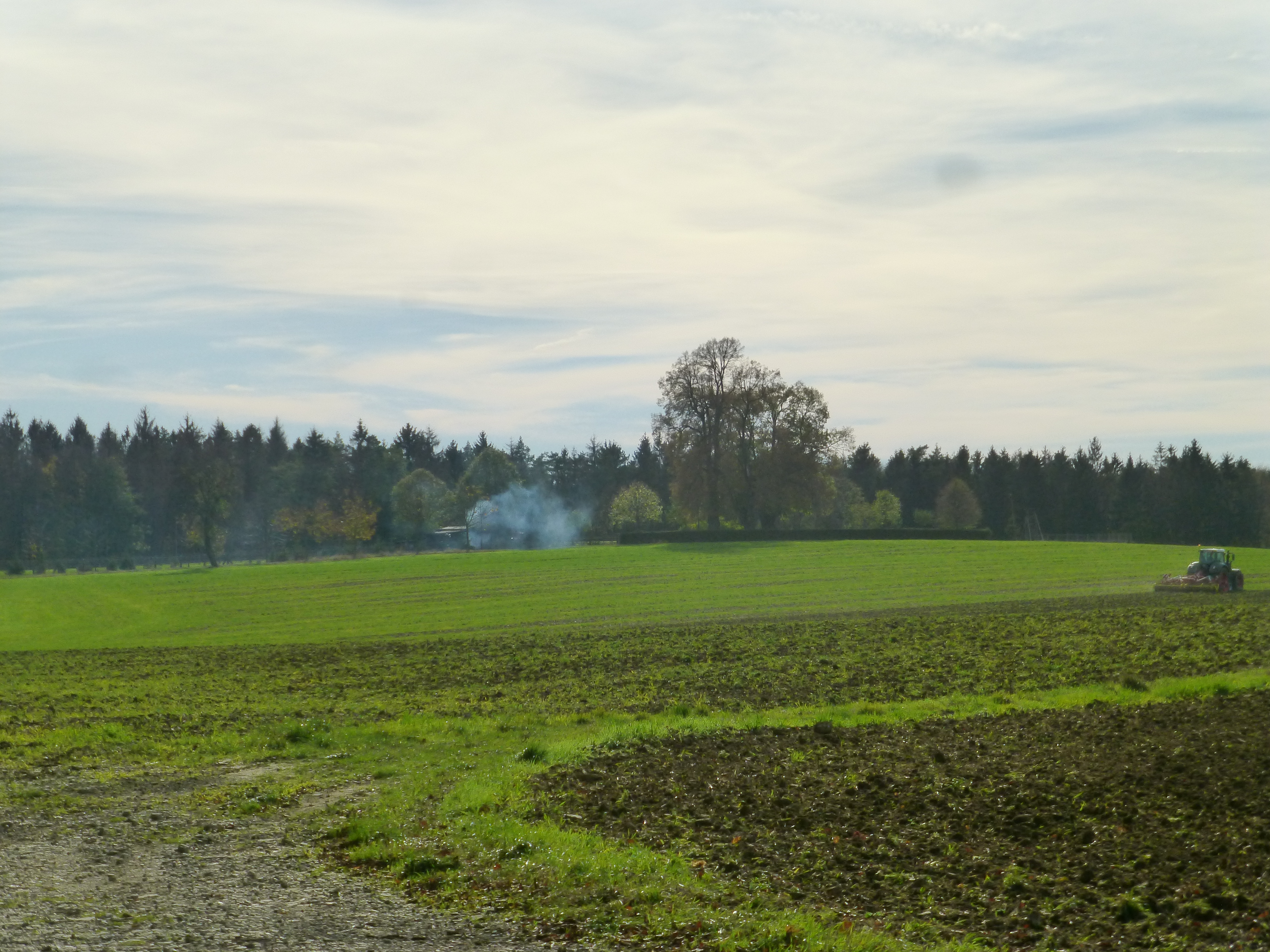 Auf dem Karnberg mit Blick zum ehemaligen Gut